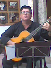 Tocando en su habitual posión